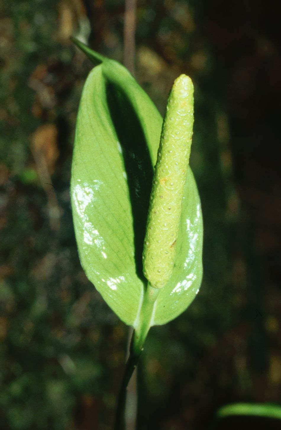 Spathiphyllum silvicola, Aronstabgewächse (Araceae) – Costa Rica: Prov. Puntarenas, PN Piedras Blancas, Bosque Esquinas bei La Gamba, "Ocelot Trail"